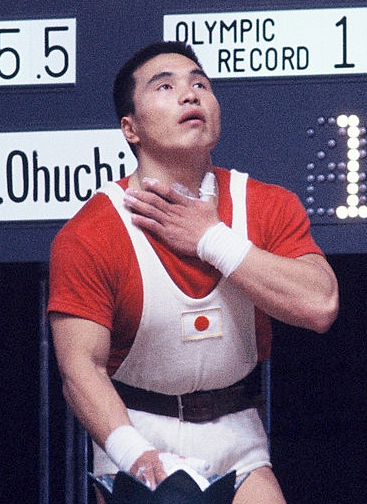 Masashi Ouchi, 1964 Olympics